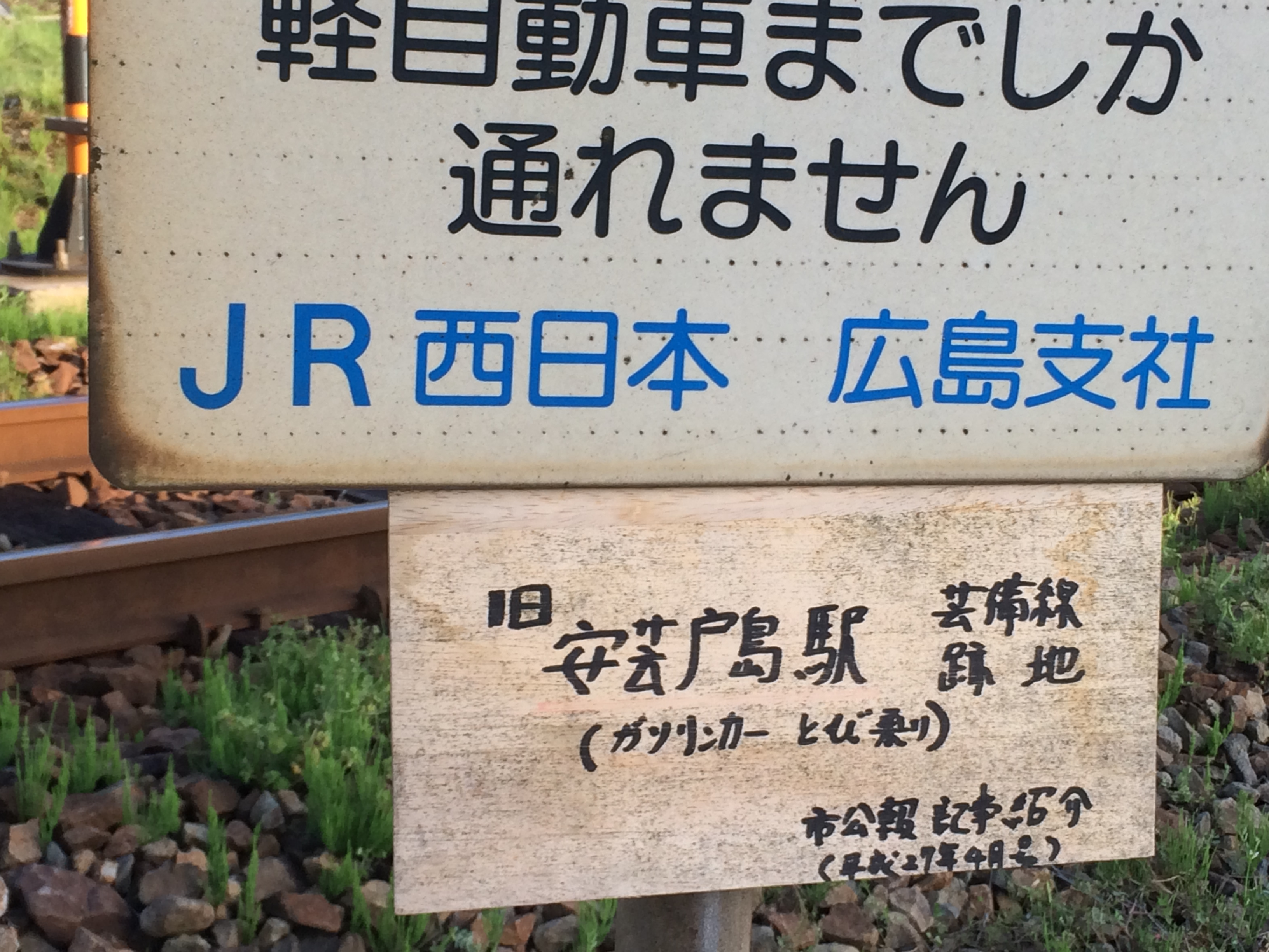 地ヶ原踏切に設置された看板。